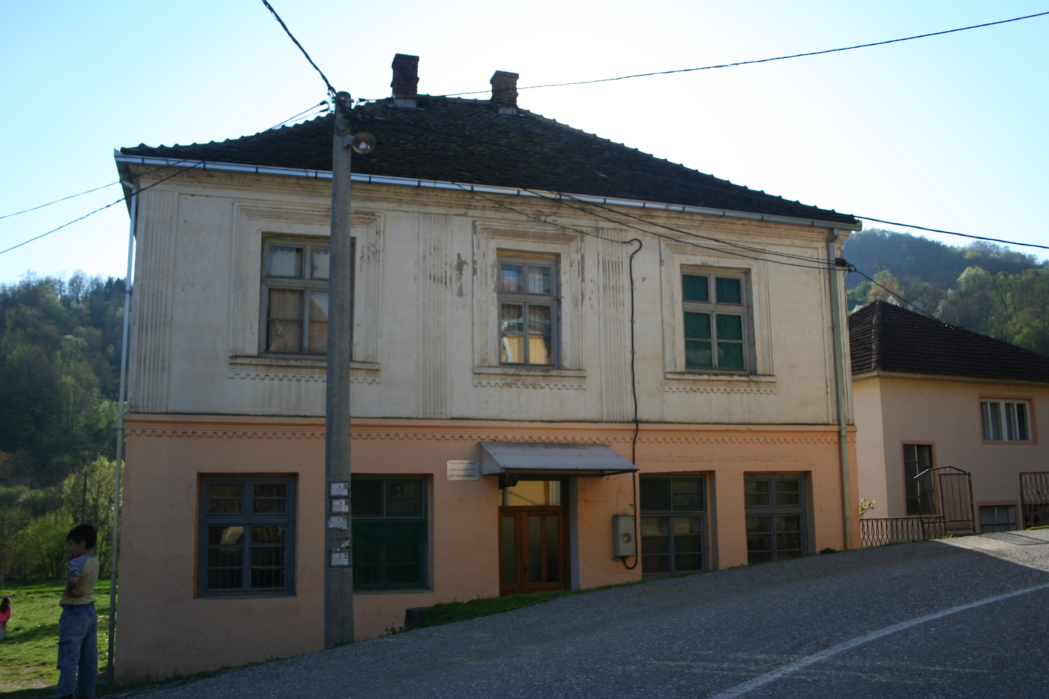 Centar sela, Gračanica